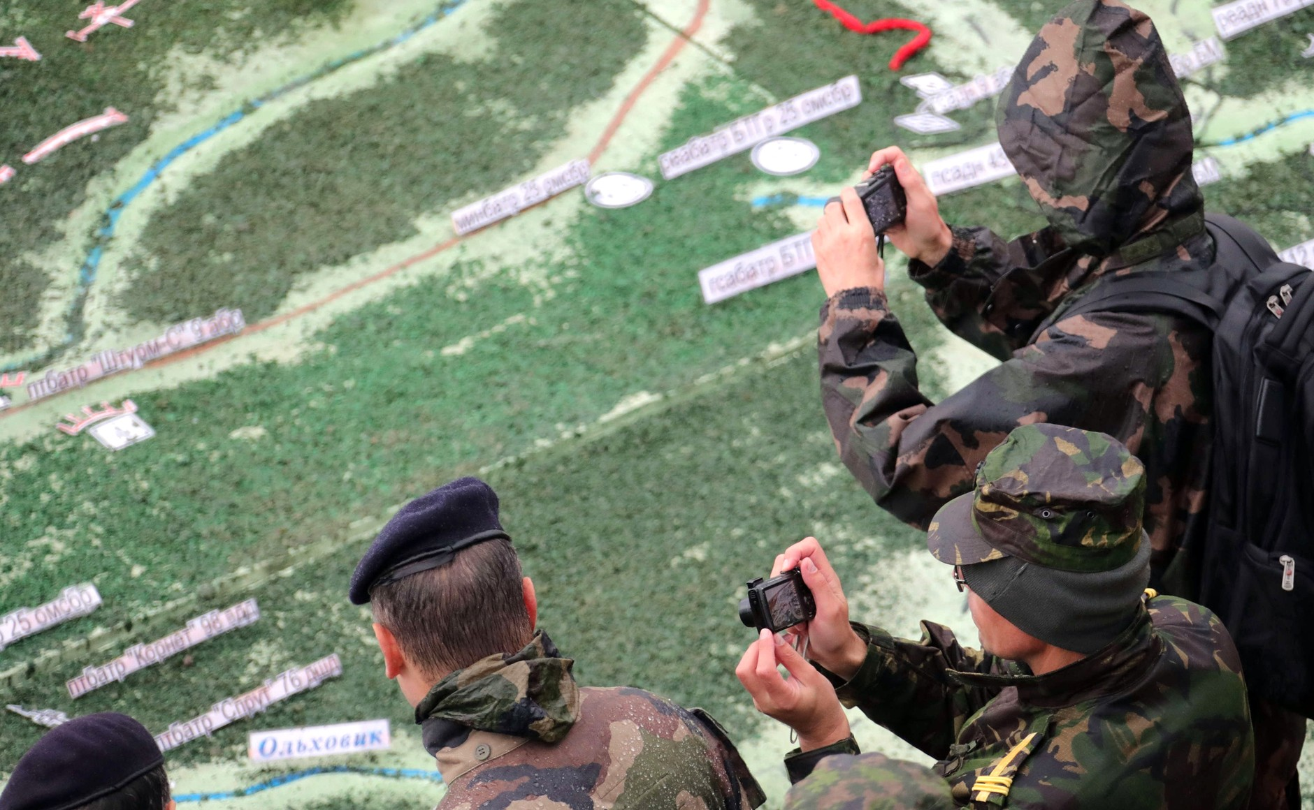 Иностранные наблюдатели на полигоне Лужский во время основного этапа совместных российско-белорусских стратегических учений «Запад-2017»